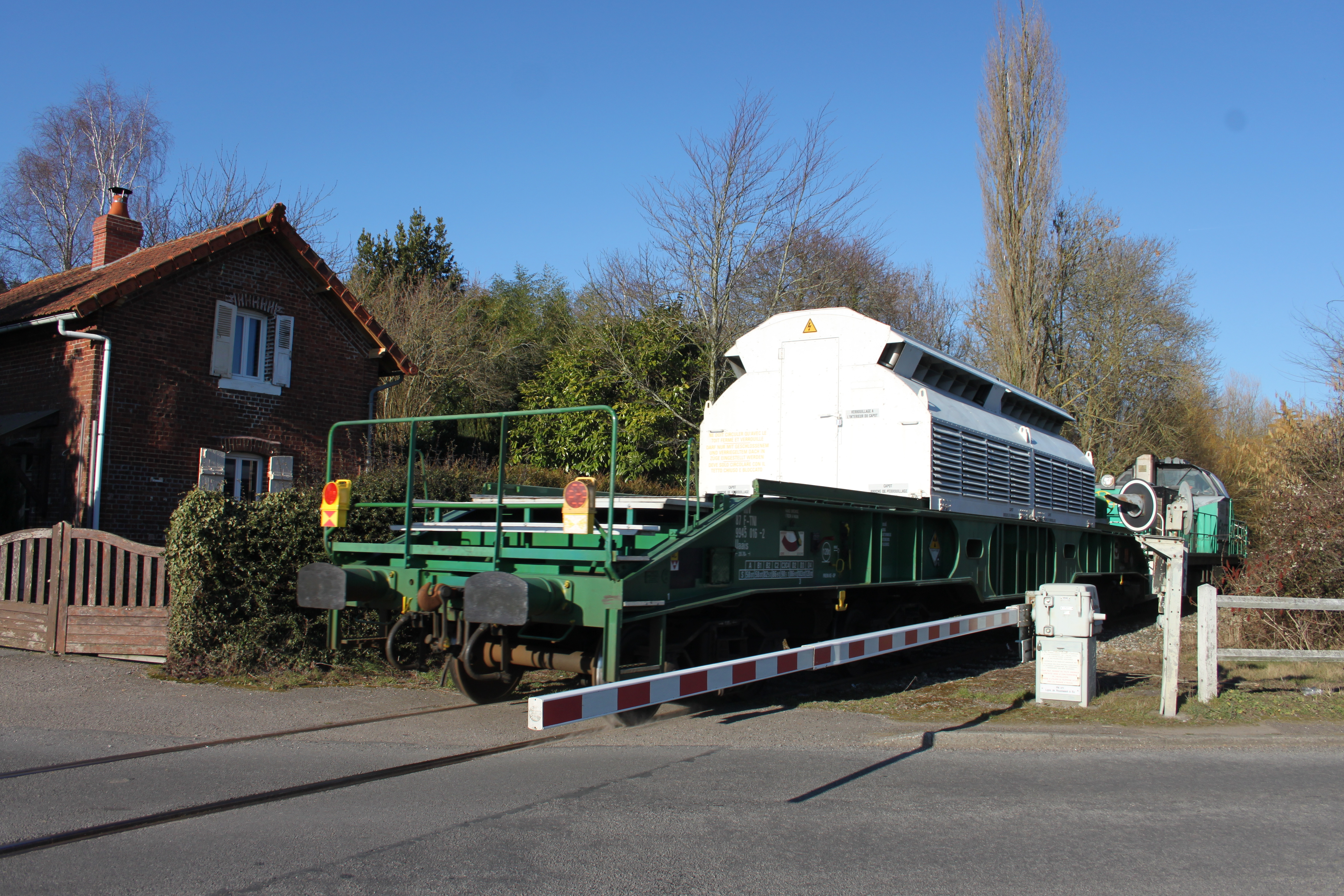 Ligne de Rouxmesnil à Eu, Martin-Eglise (Seine-Maritime),P.N.n°1, passage d'un wagon de combustible nucléaire tiré par la machine 460003 .